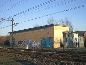 Unterwerk in Wijhe, Niederlande